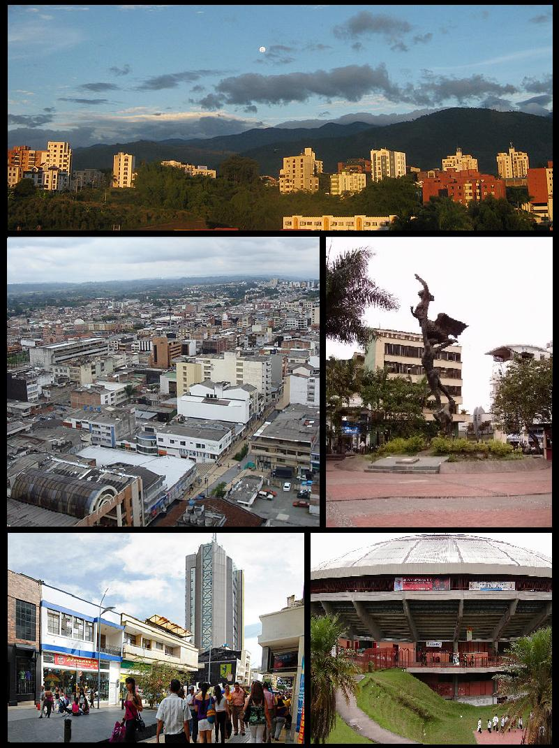 Collage de la ciudad de Armenia-Quindio-Colombia